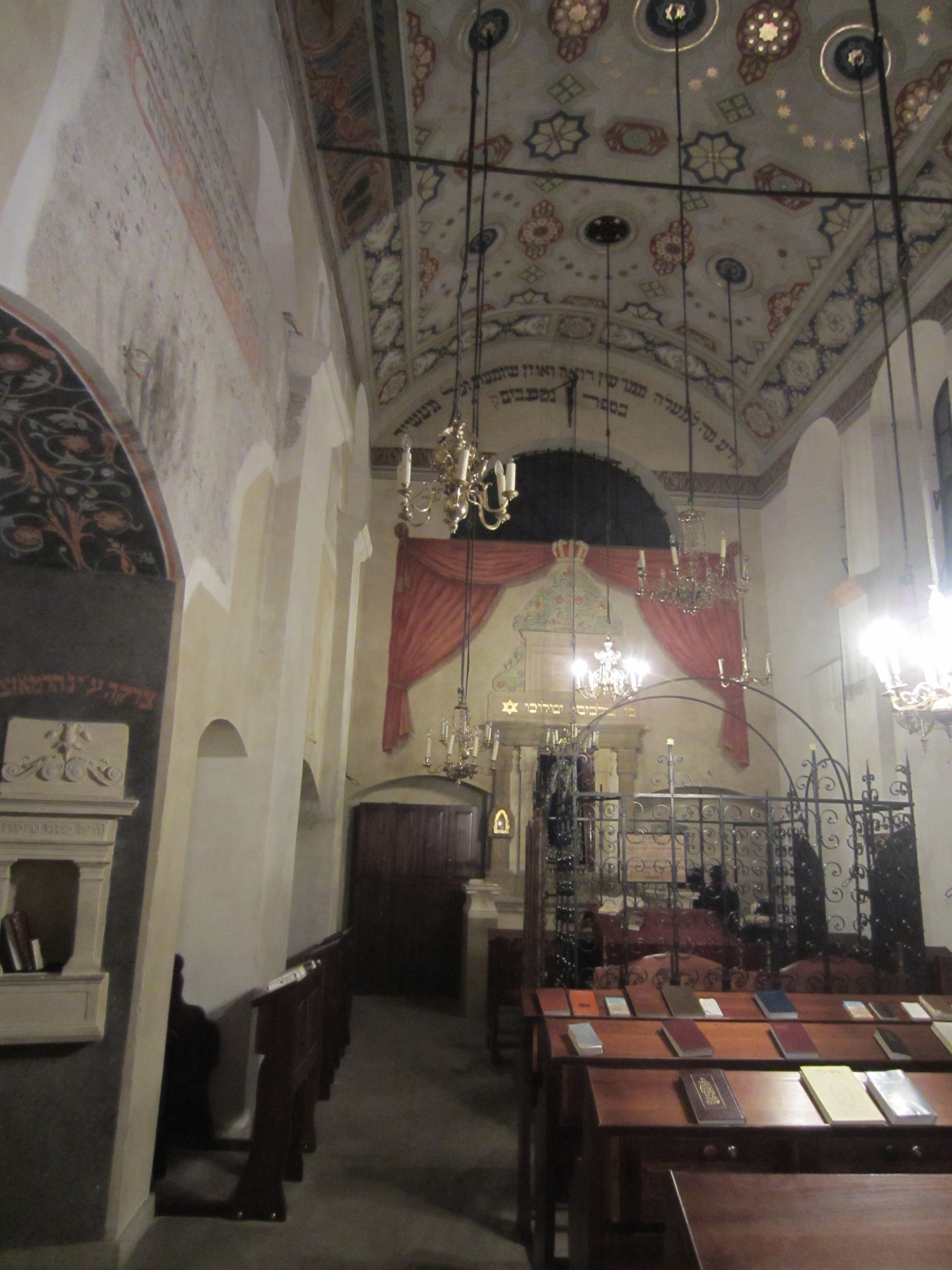 בית כנסת הרמ"א - פנים (15).jpg